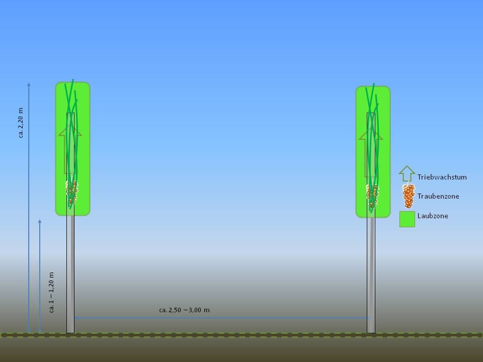 Hochkultur splierartig